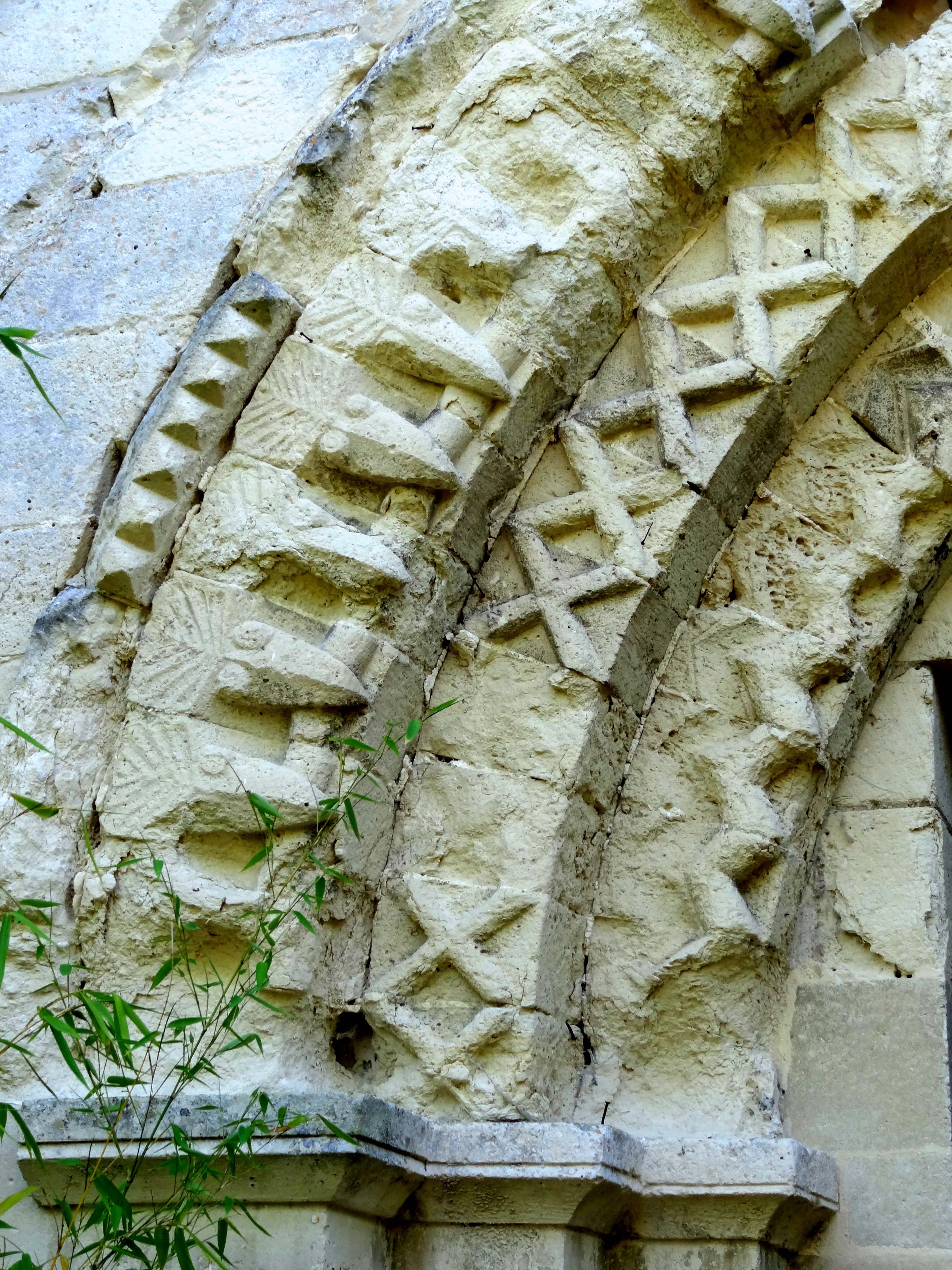 Église Sainte-Geneviève de Marolles - voir titre.